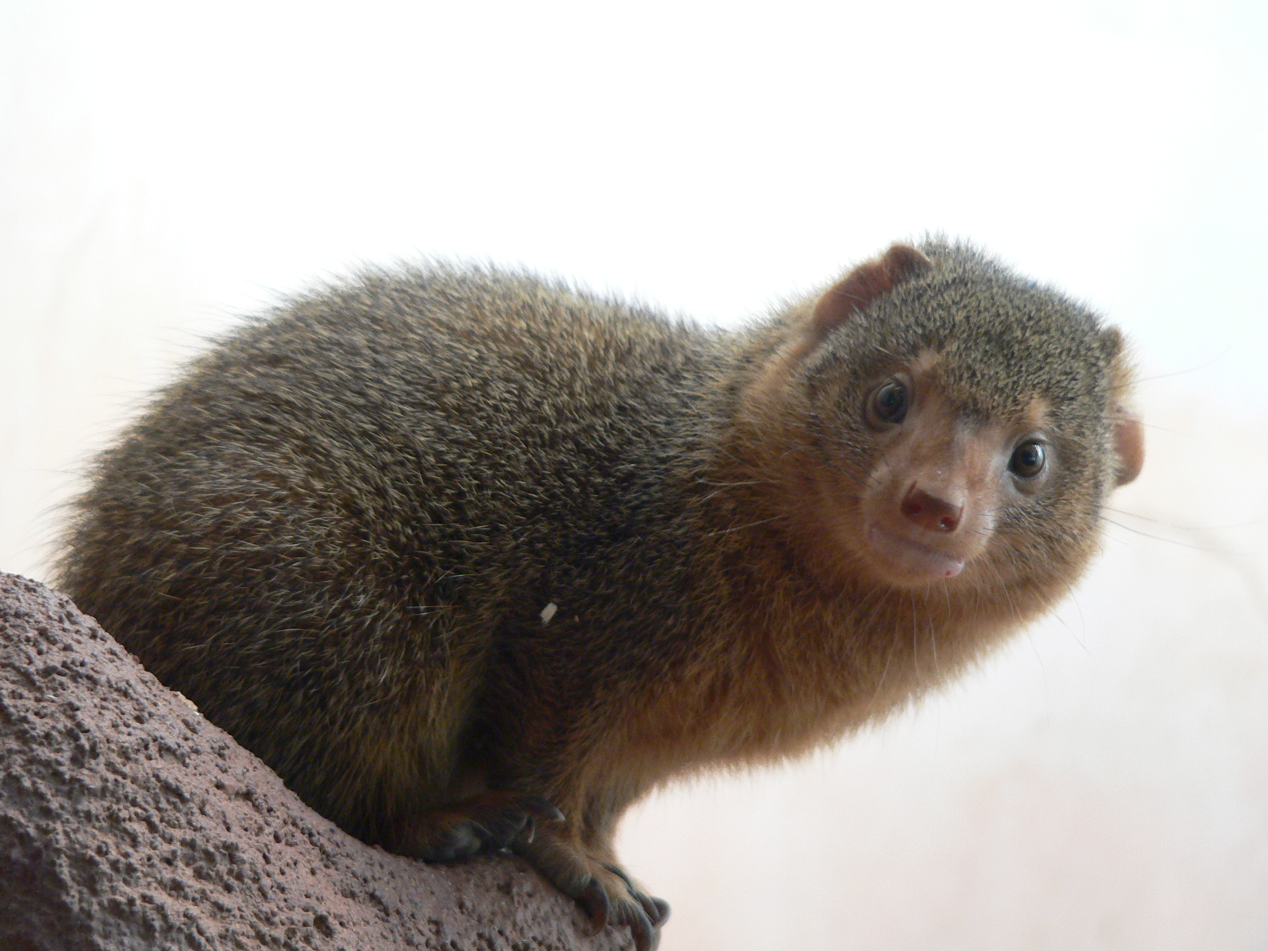 Helogale parvula